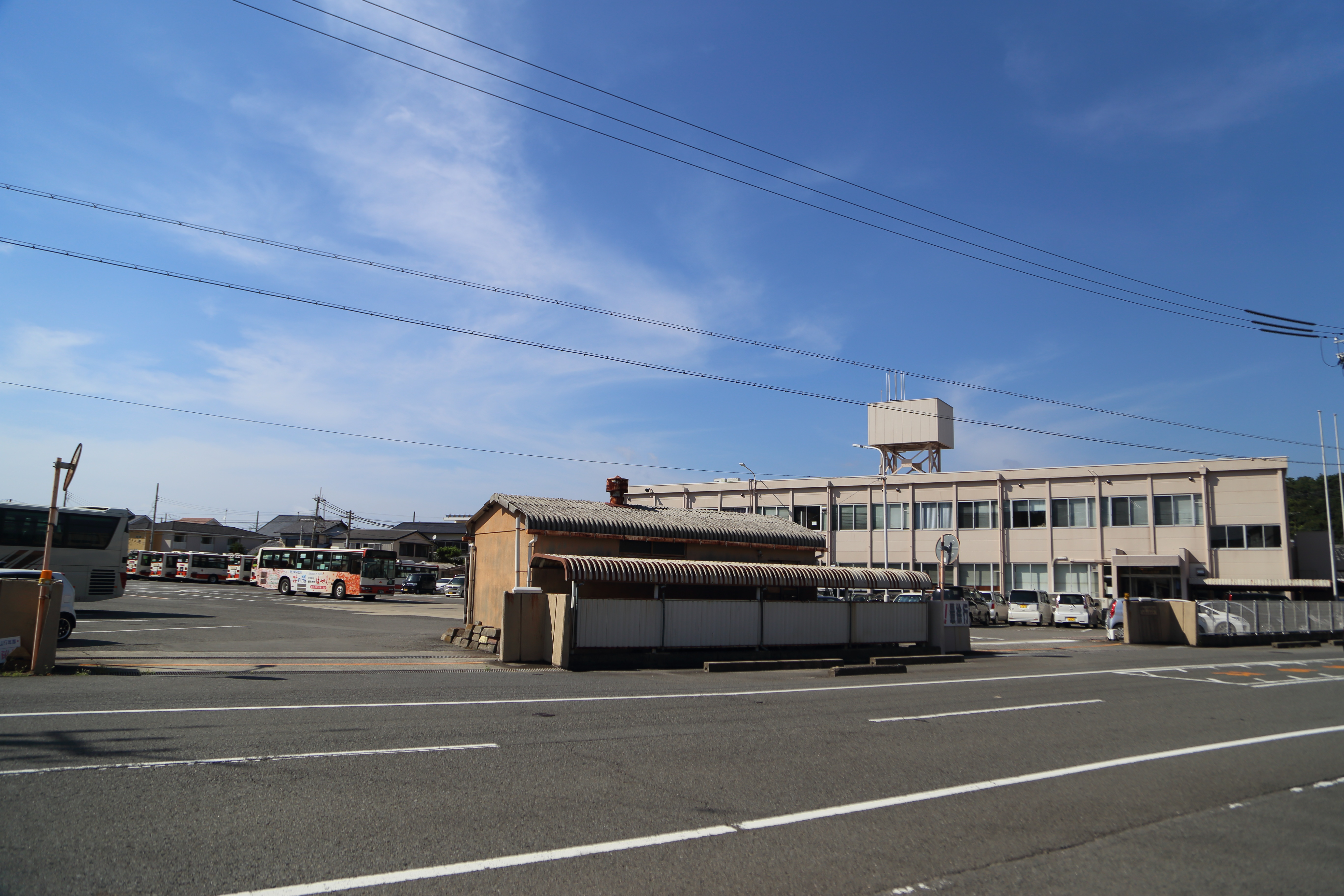 和歌山バス本社・和歌山営業所。